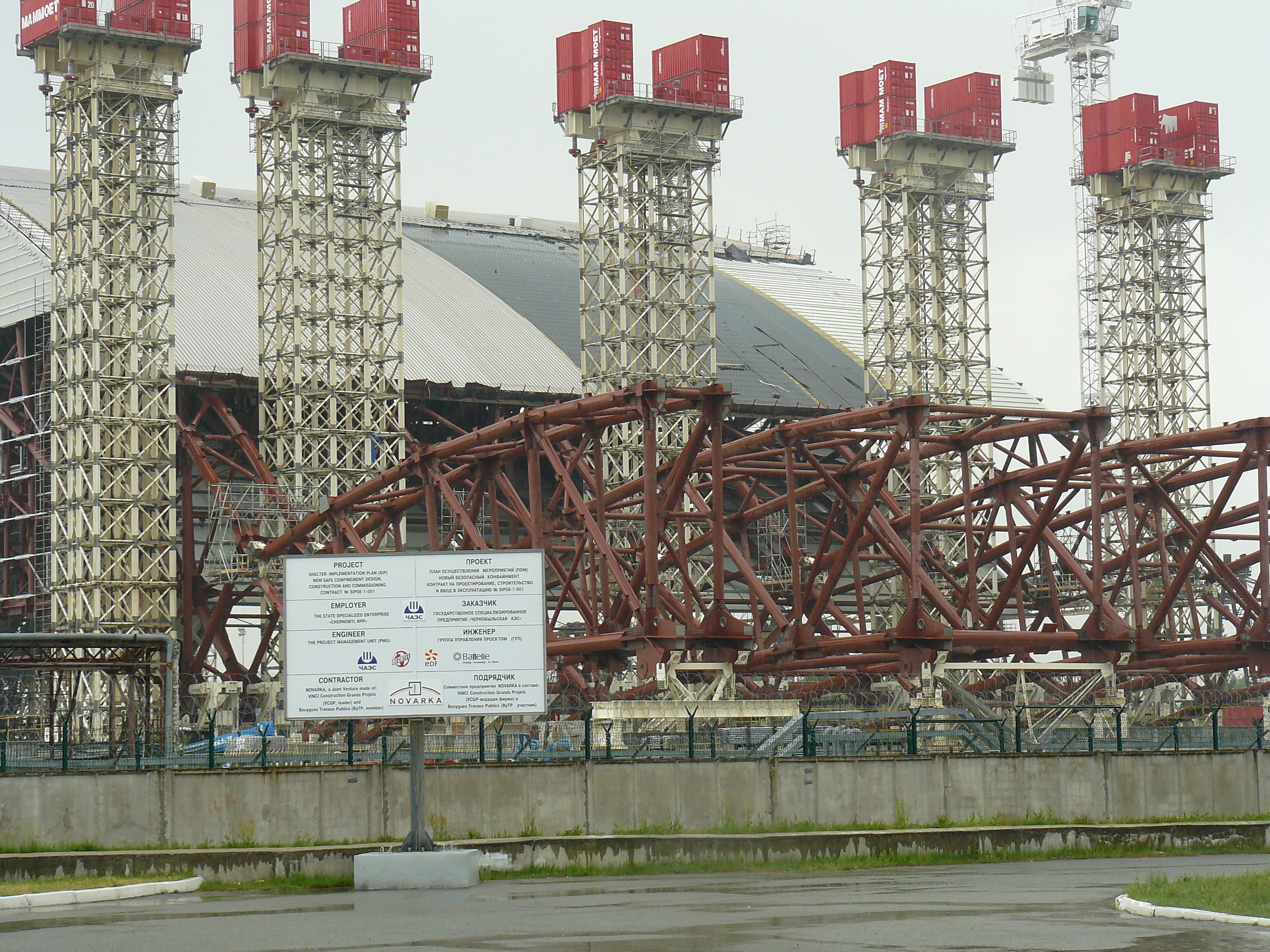 Вікіекспедиція до Чорнобильської зони